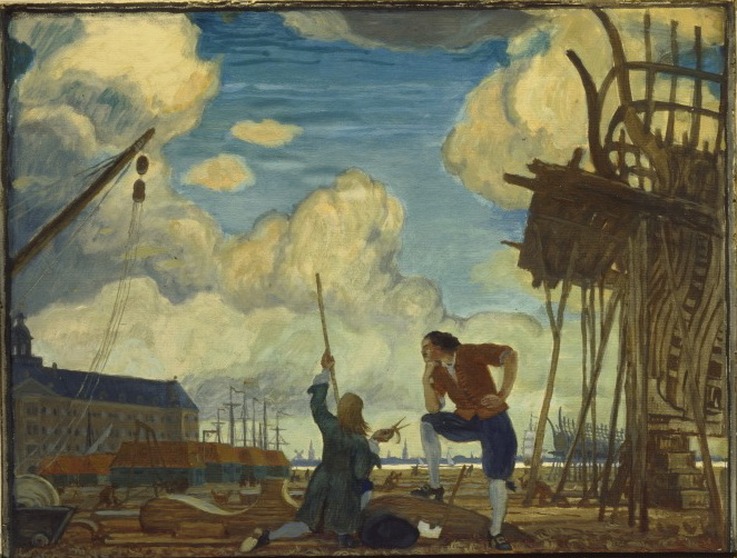 Добужинский Мстислав. «Петр Великий в Голландии. Амстердам, верфи Ост-Индской Компании» 1910 Масло, бумага на картоне 41 х 52,8 Государственная Третьяковская галерея Москва